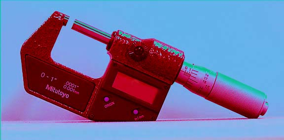 micrometer eigen foto